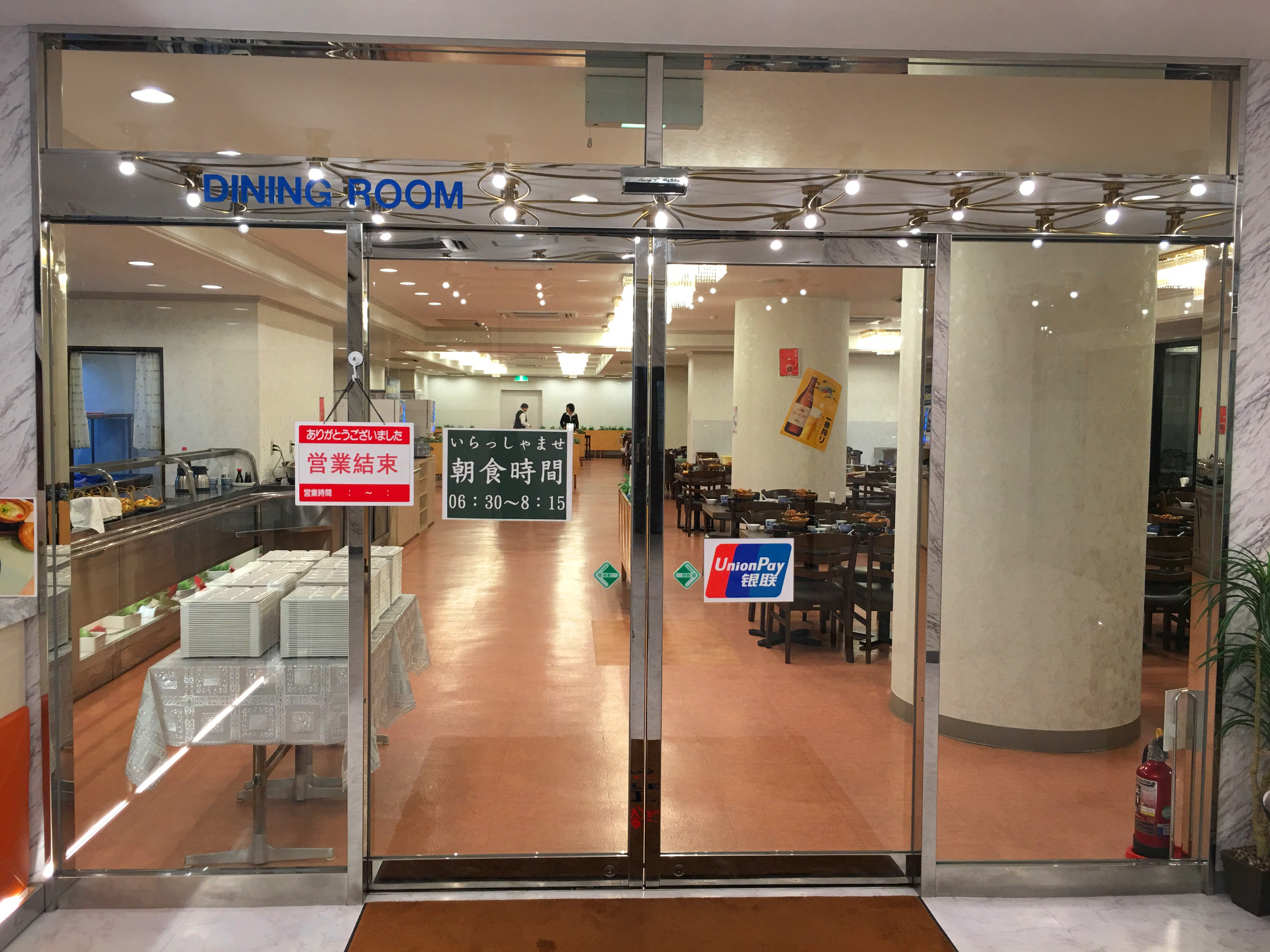 中文（中国大陆）: 在日本千叶县一家酒店的餐厅的银联使用标识